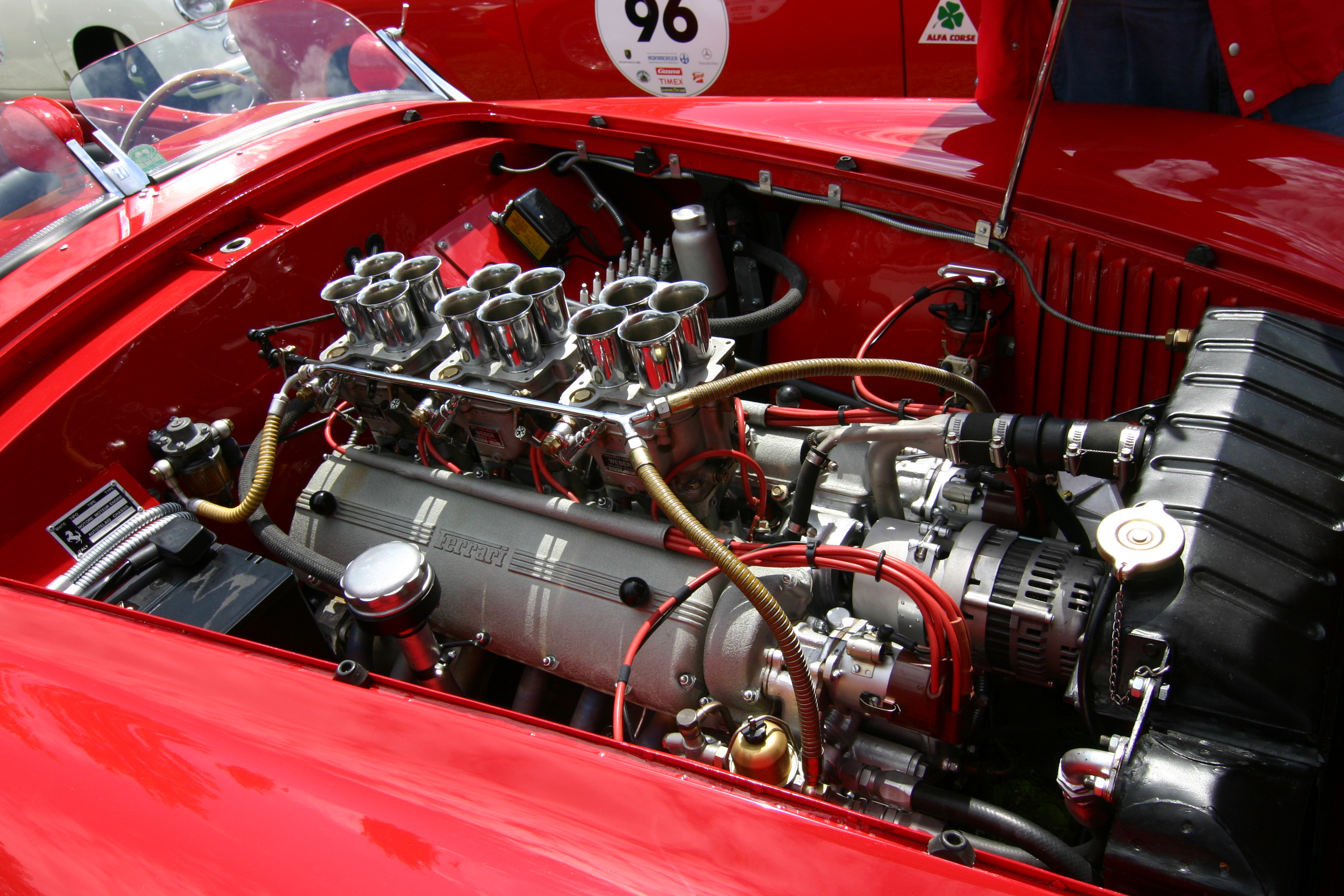 Ferrari 212 Barchetta Touring - Motor; Gaisbergrennen 2006, Salzburg., Hellbrunn